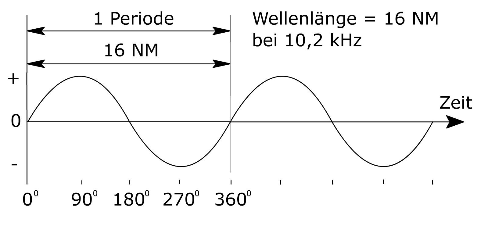 OMEGA Navigationssystem, Funktionsweise